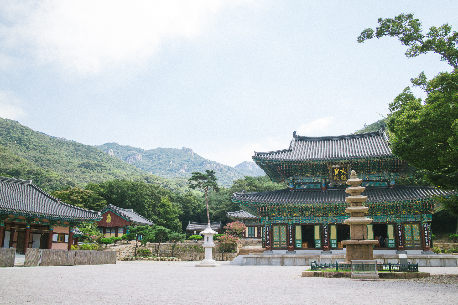 도갑사 오층석탑